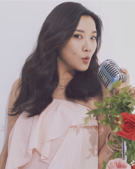 호란의 마리끌레르 코리아 여성의 날 화보